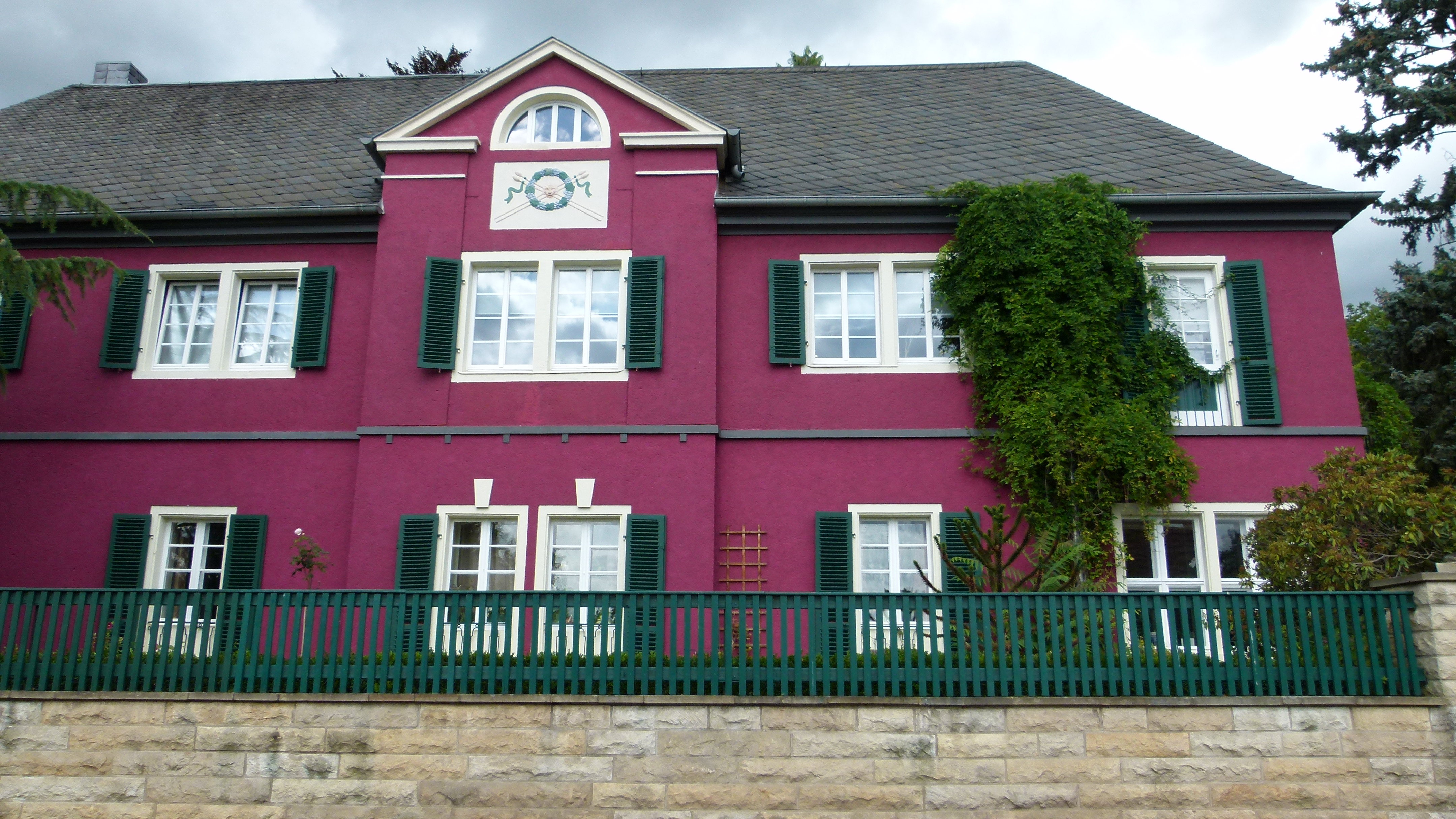 Denkmalgeschütztes Haus, Augustusweg 96, Radebeul, Sachsen